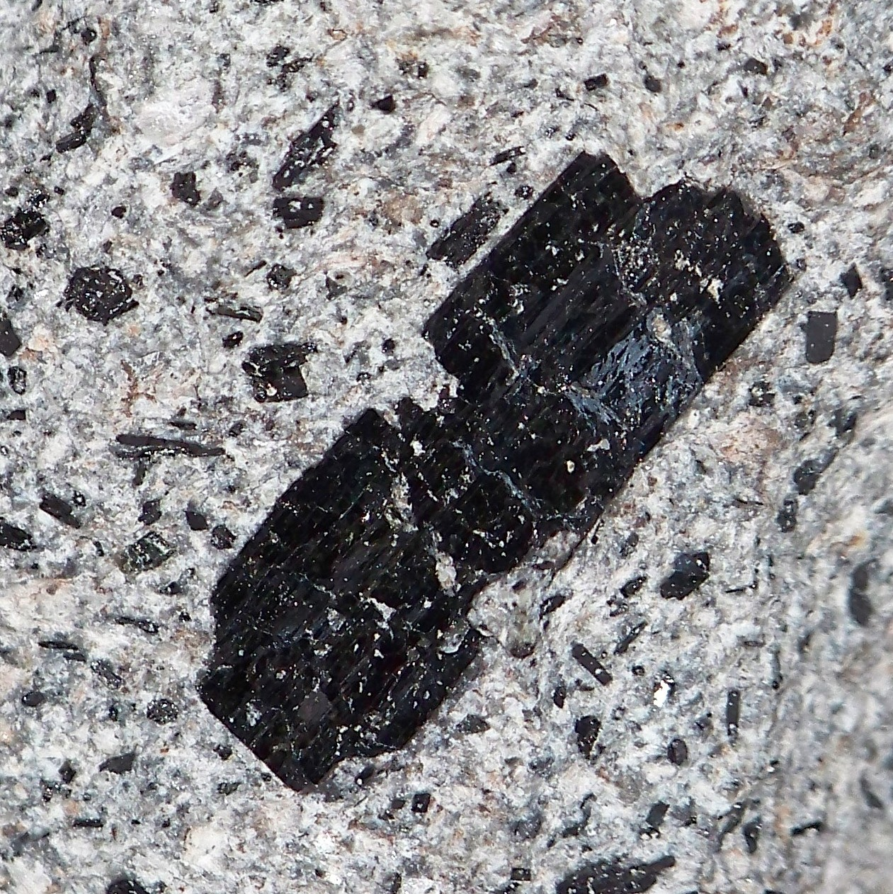 Augit z andezytu pienińskiego.